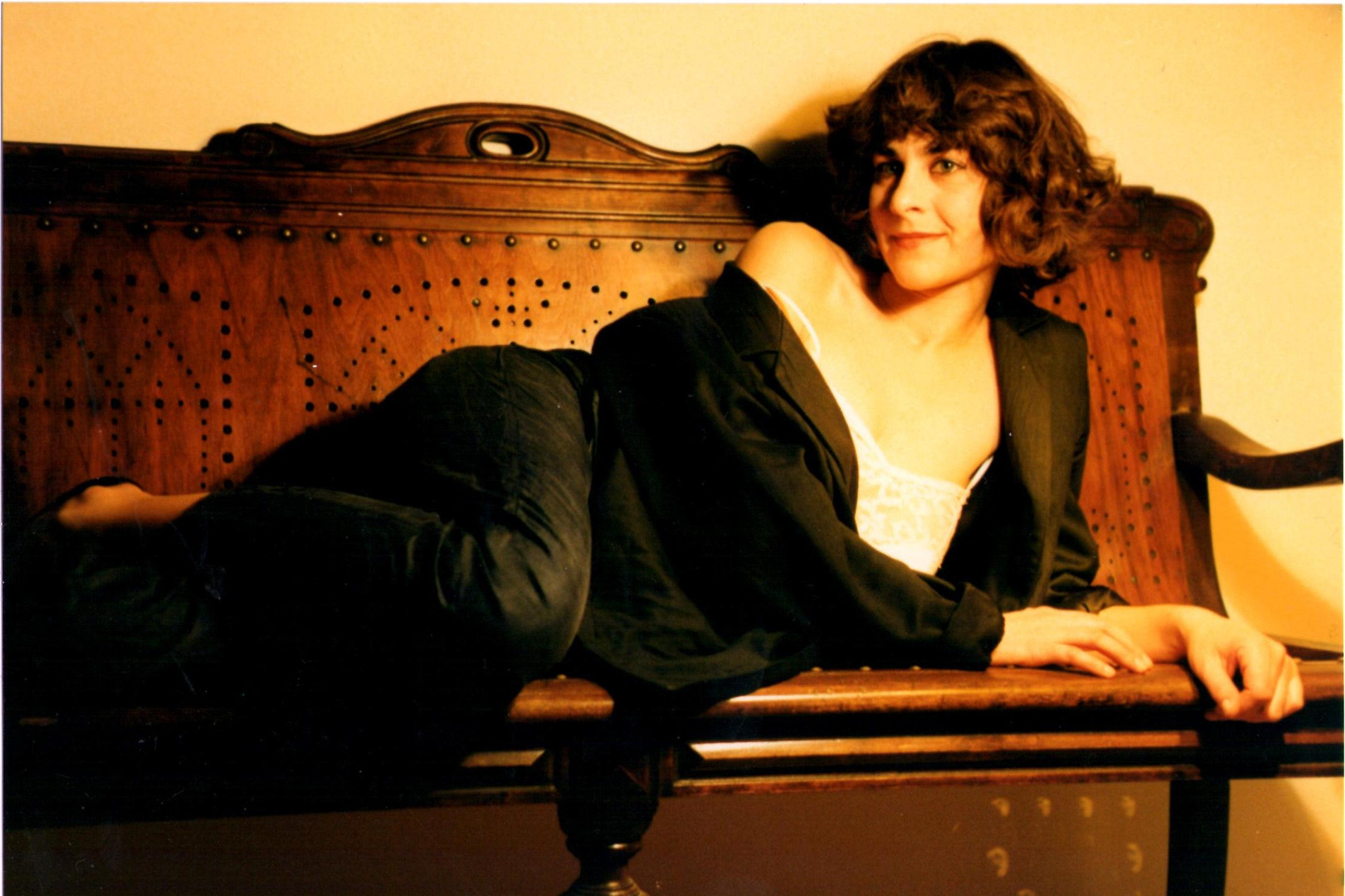 München (Privatsammlung)